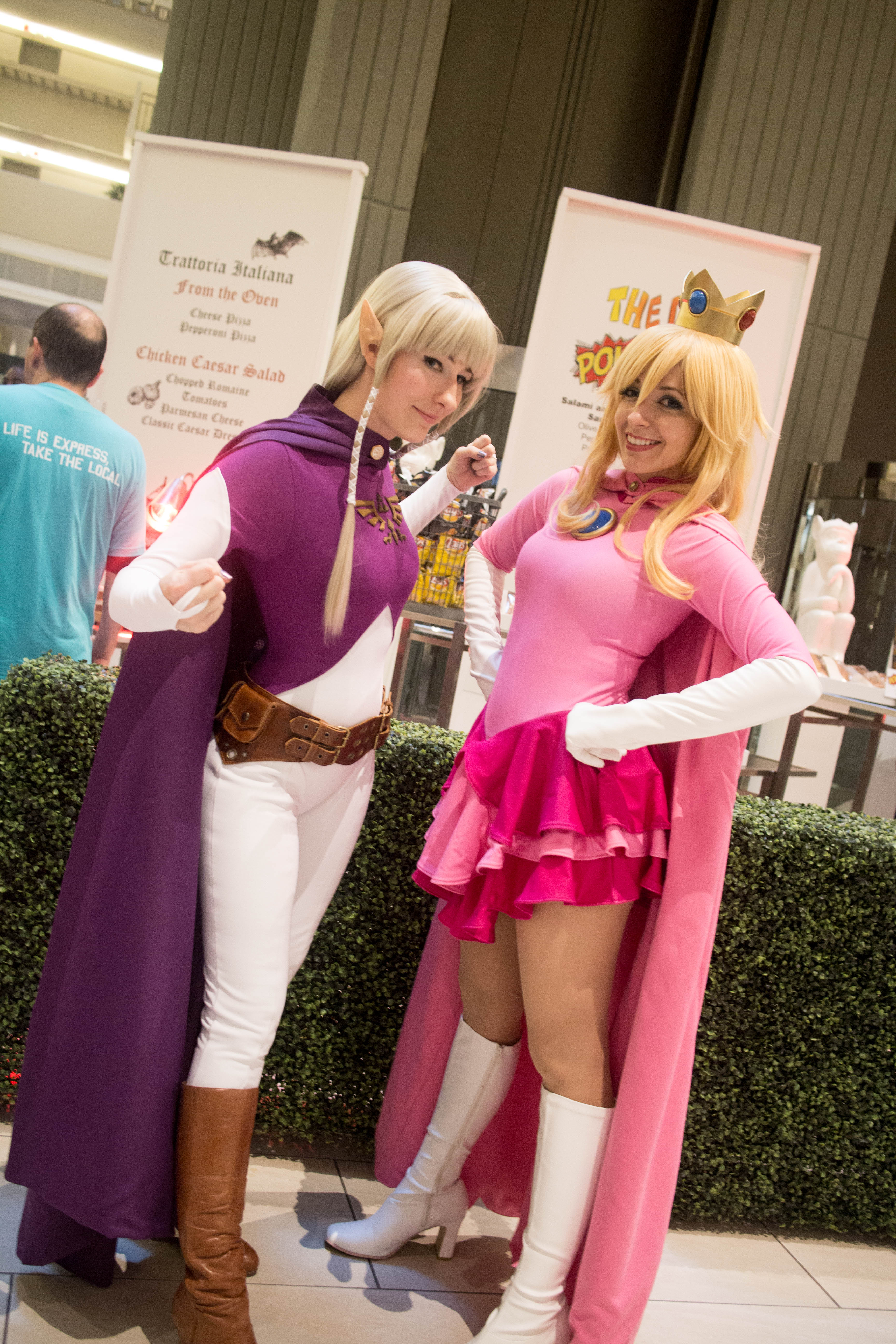 Cosplay at Dragon*Con 2013.